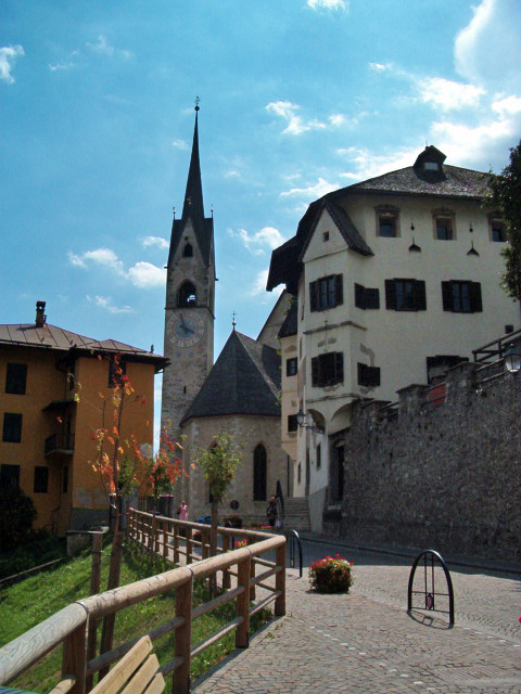 Fiera di Primiero, Pieve di Santa Maria Assunta e il Palazzo delle Miniere (o del Dazio)